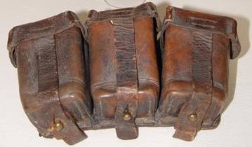 Deutsche Patronentaschen M1909 (Garnisonmuseum Ludwigsburg)